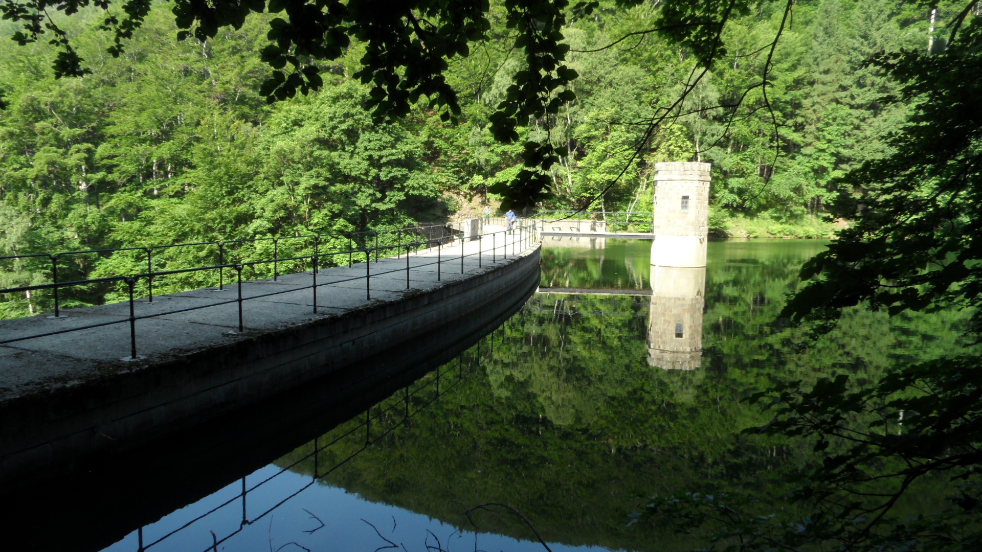 Přehrada (Jezeří), k. ú. Jezeří a k. ú. Podhůří u Vysoké Pece (okr. Chomutov), Jezeří